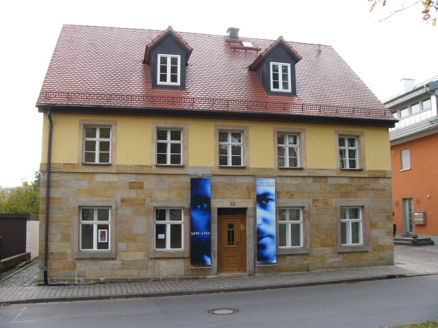 Geburtshaus und heutige Gedächtnisstätte von Wilhelm Leuschner in Bayreuth, Moritzhöfen 25